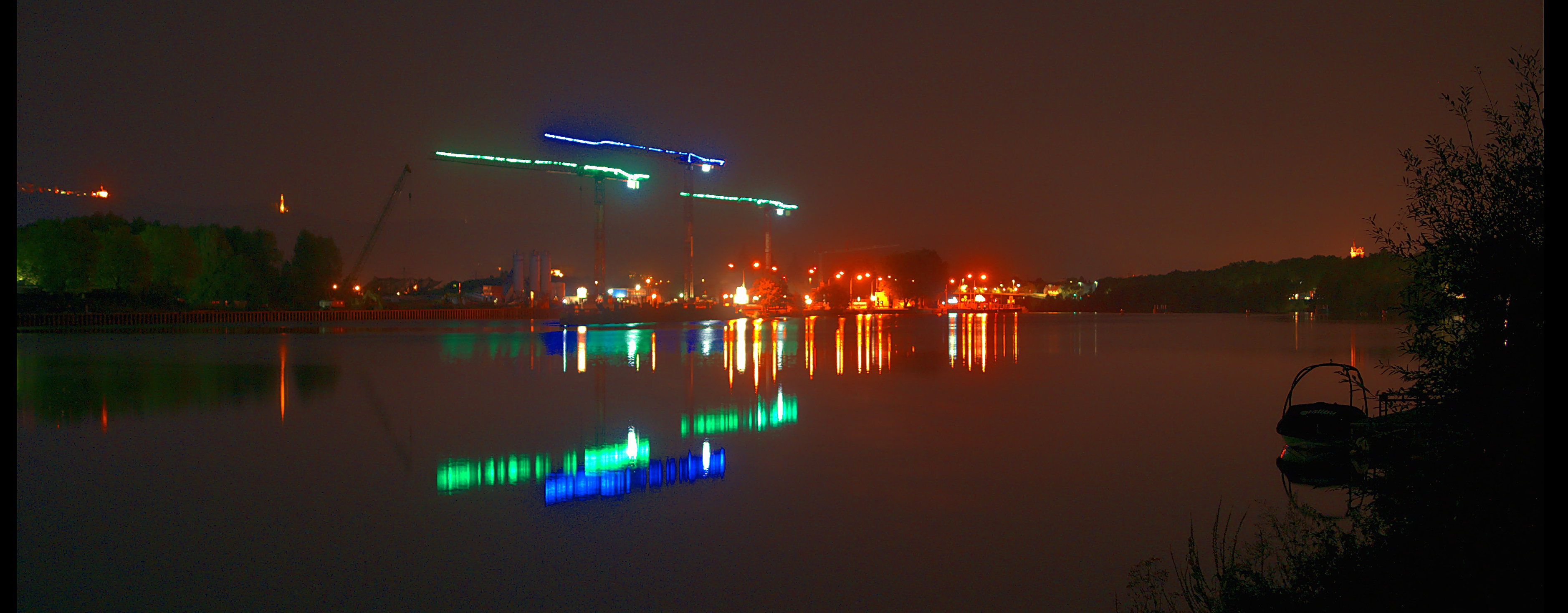 Die Schleuse Trier im September 2016 - Nachtaufnahme der Bauaurbeiten zur Errichtung einer zweiten Schleusenkammer. Aufnahmestandort Moselradweg bei Restaurant Estricher Hof. Im Hintergrund: Ganz links oben die Häuser vom Markusberg. Über dem Kran die Mariensäule, und ganz rechts der Turm von St. Mattias